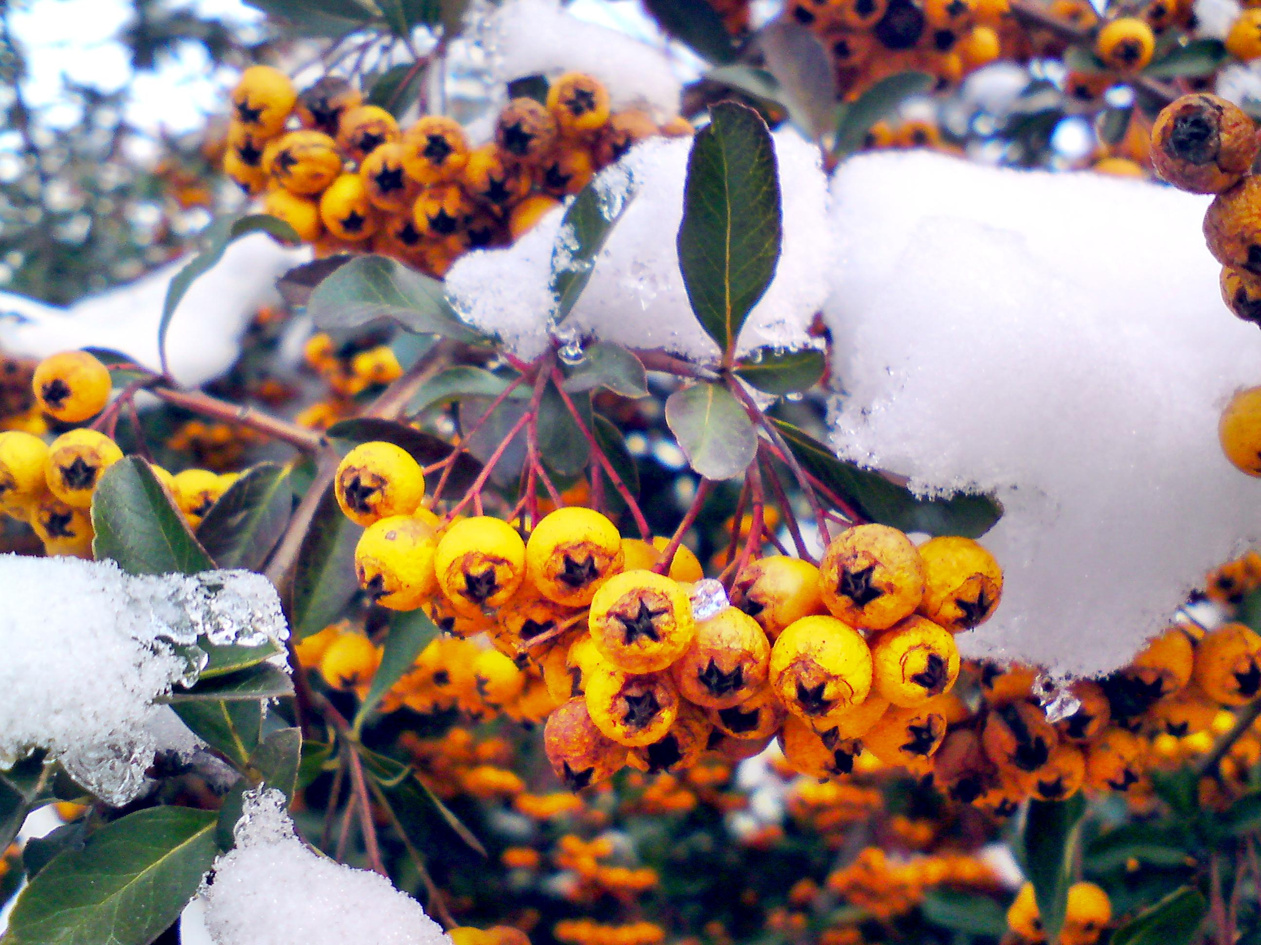 Сняг и плодчета